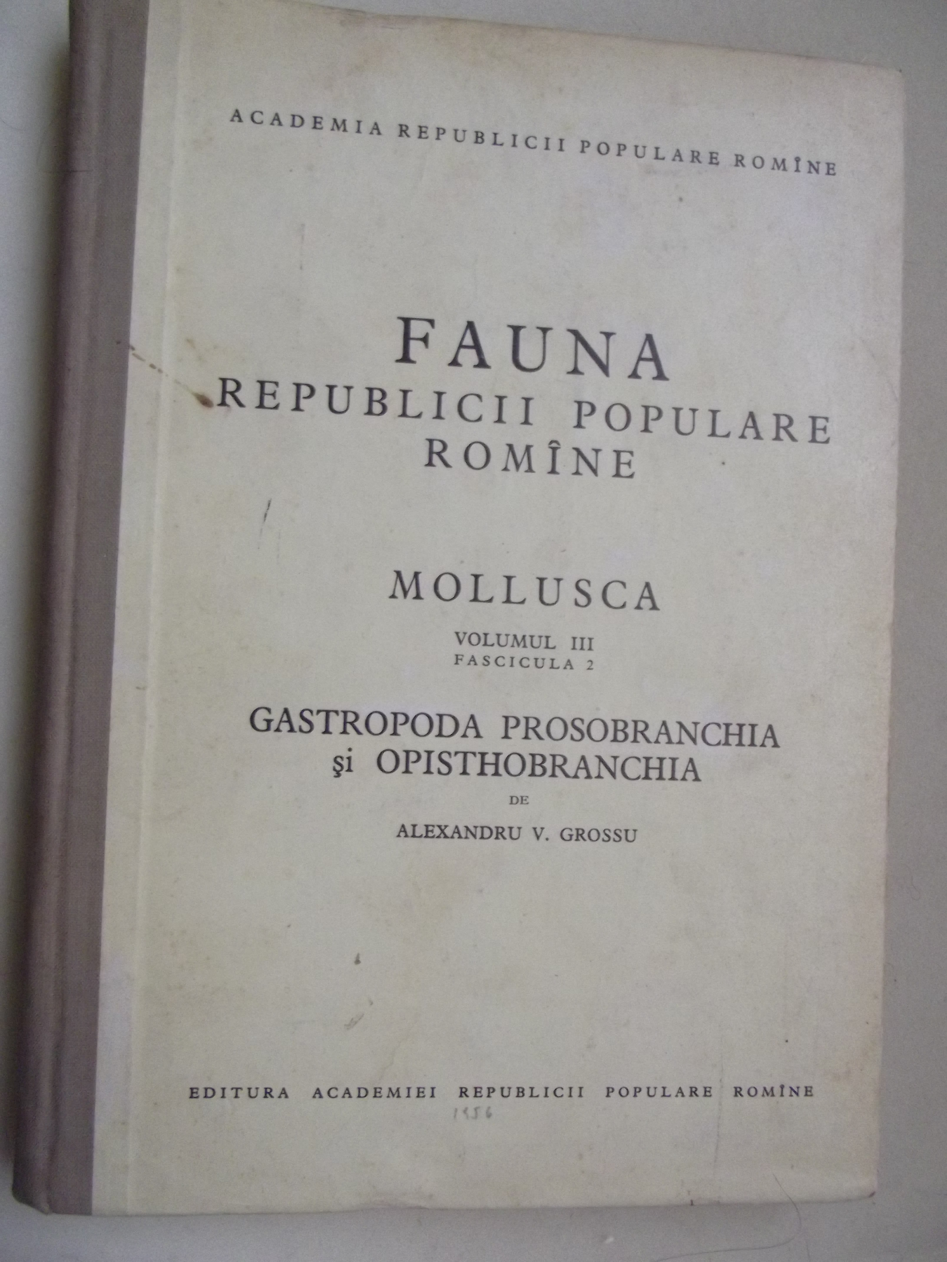 Fotografie copertă Fauna